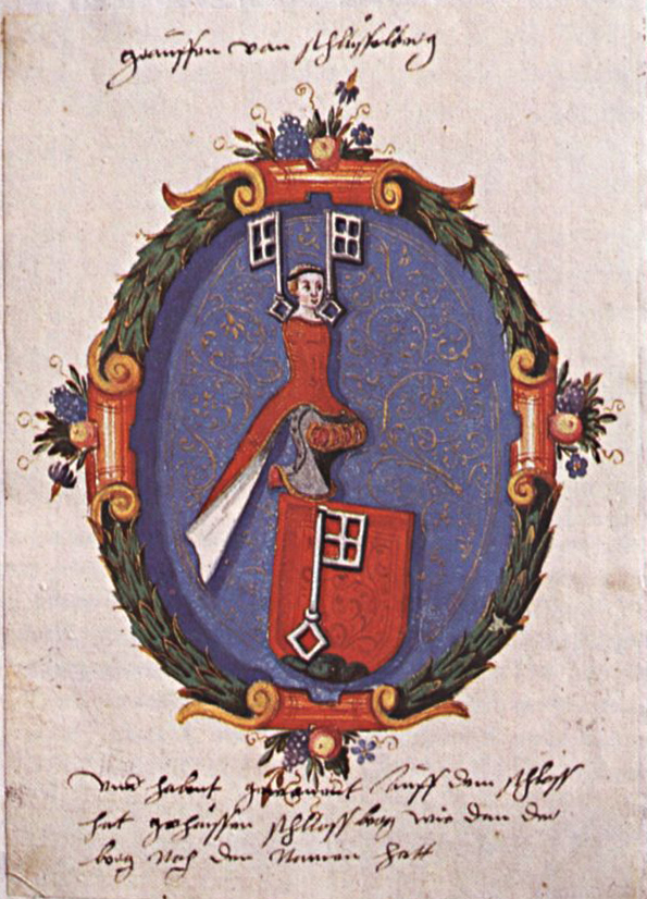 Reichsabtei Gutenzell. Wappen der Familie von Schlüsselberg, die nach der Überlieferung das Kloster gestiftet haben soll. Ausschnitt aus der Klosterchronik.